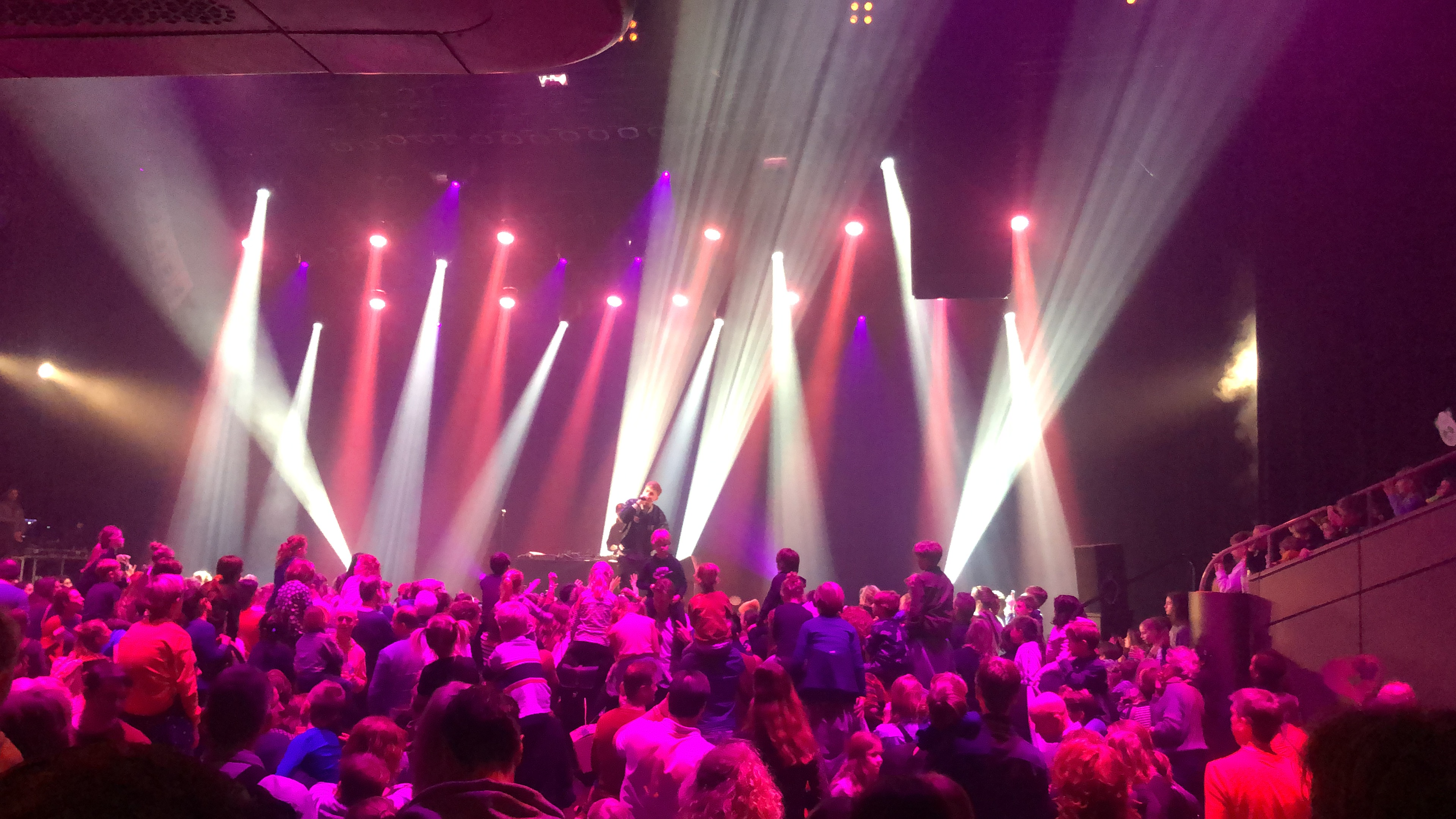 Rapper Snelle treedt op in de Ronda zaal van Tivolivredenburg tijdens My First Festival 2019